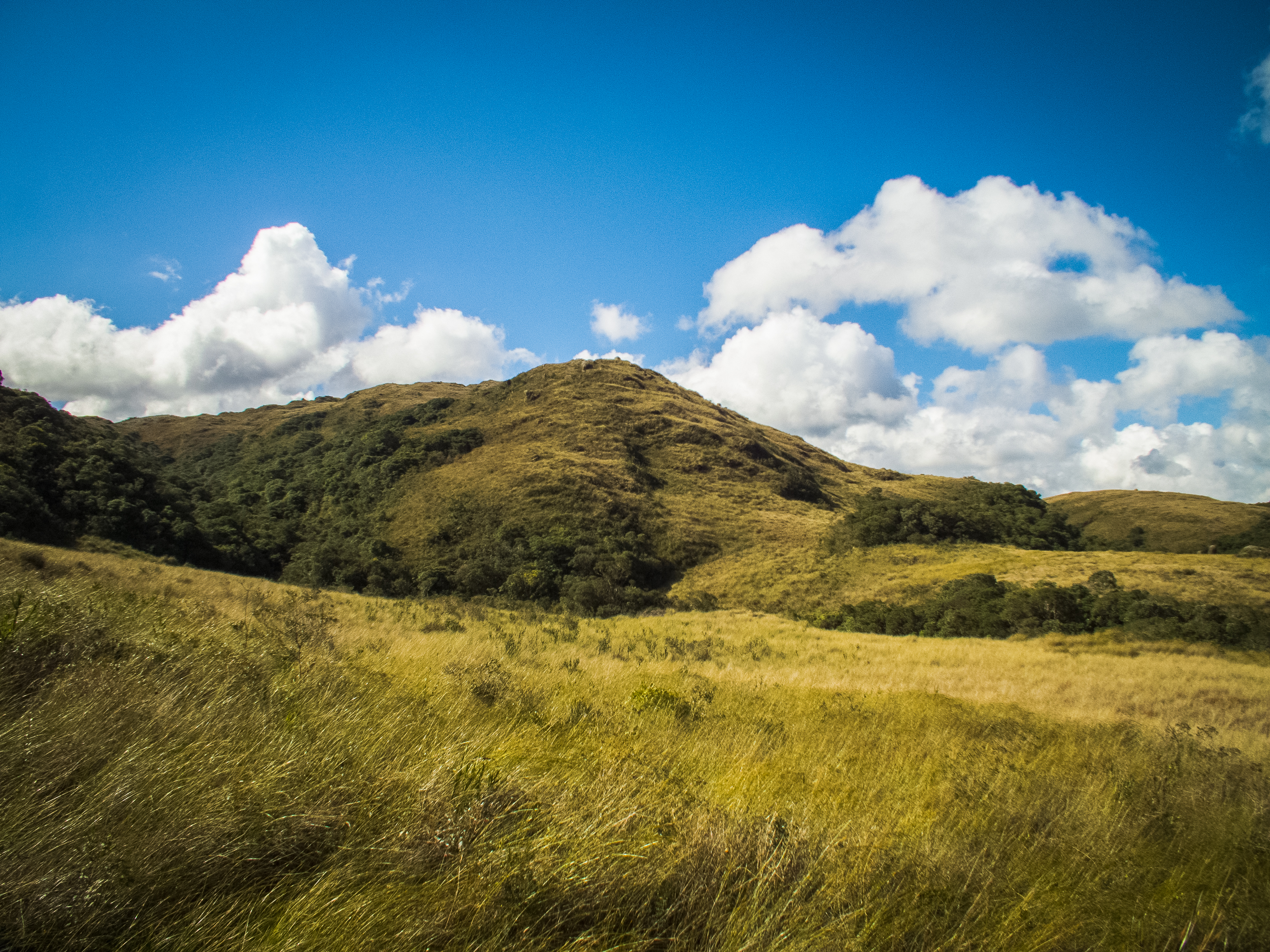 Paisagem retratada do acampamento no topo da Serra do Tabuleiro.